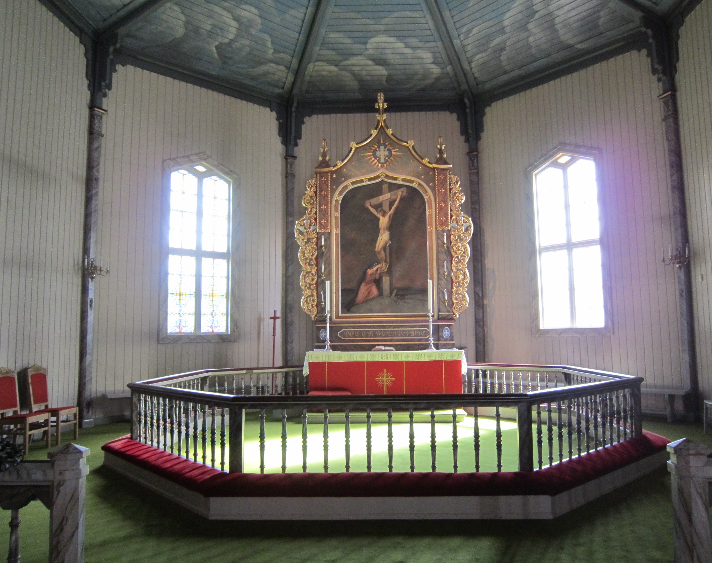 Alterparti i Nes kirke, Nesbyen